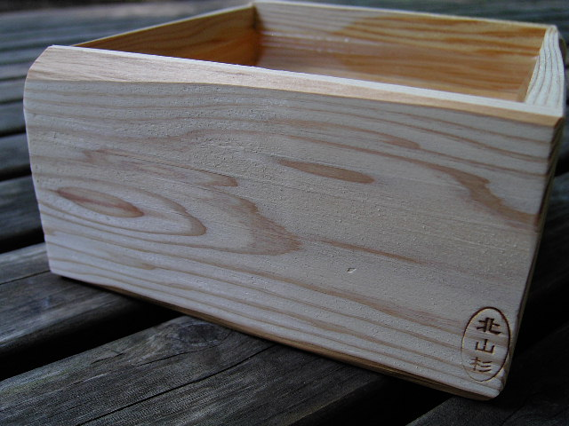 北山杉製の枡に注がれた京都市京北の地酒（道の駅ウッディ京北にて）